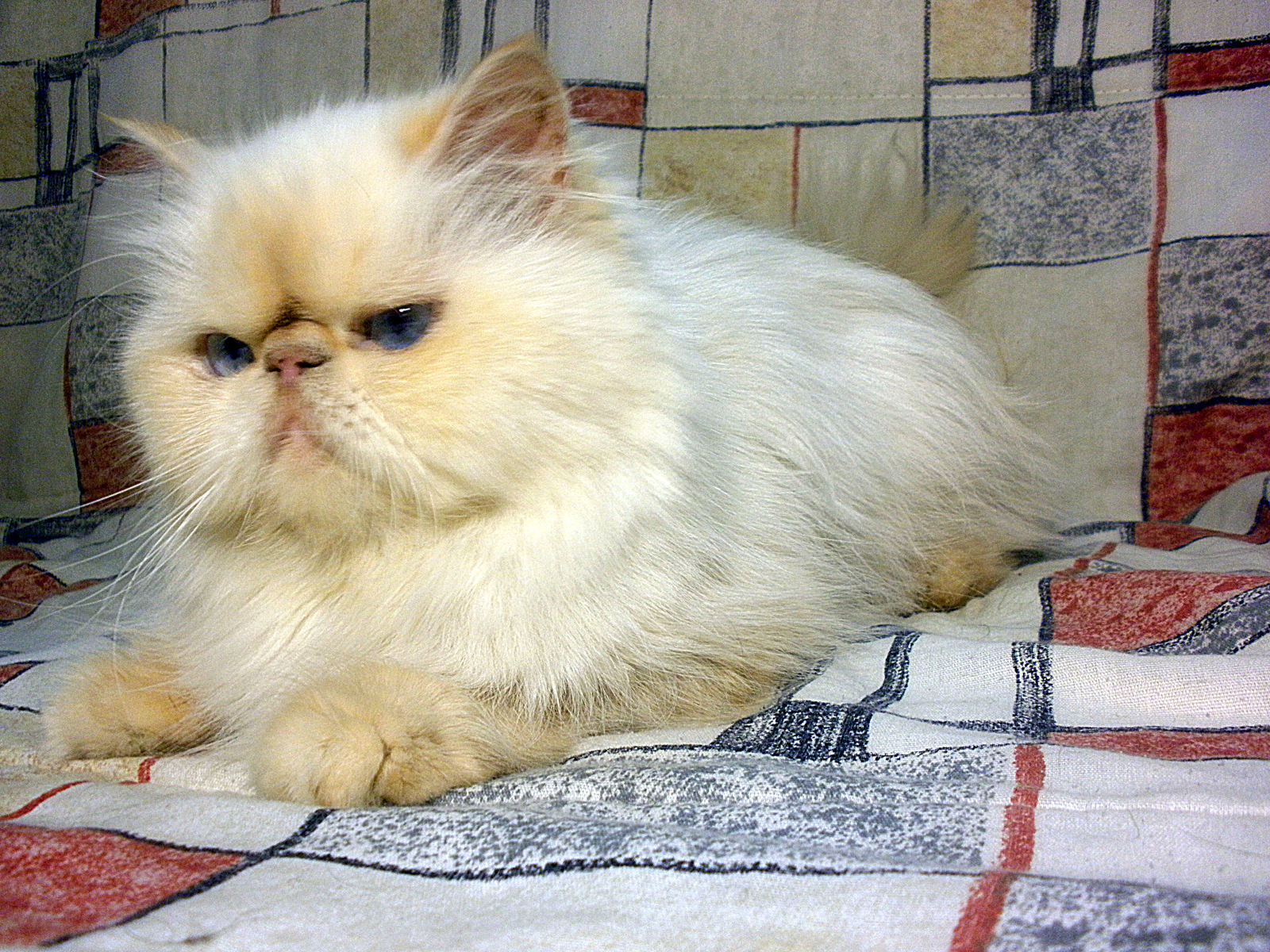 Fêmea Himalaia Red Point Padrão Show